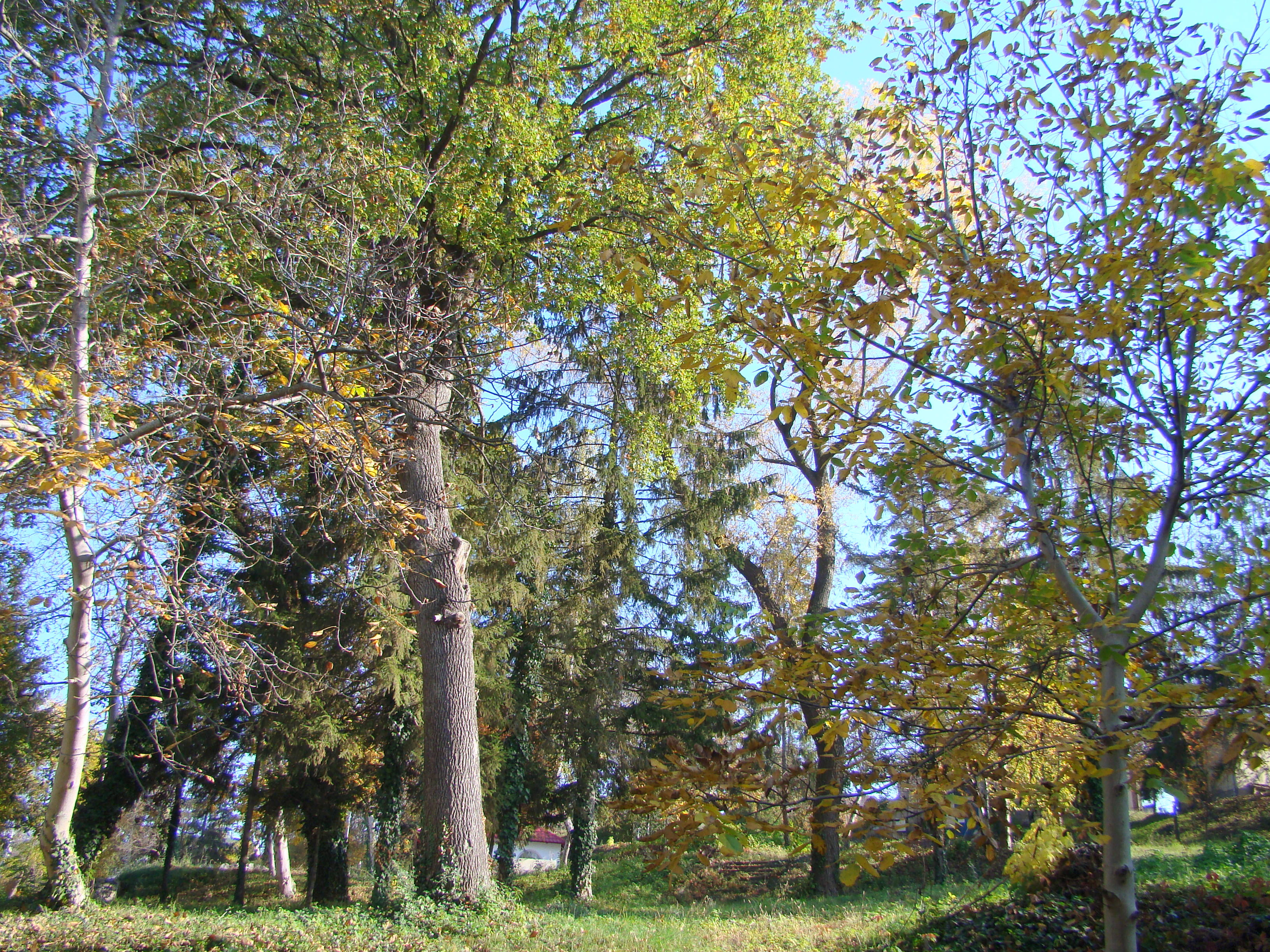 Uzina de apă și parcul, municipiul Târgu Mureș, str. Verii 4 1908 - 1909